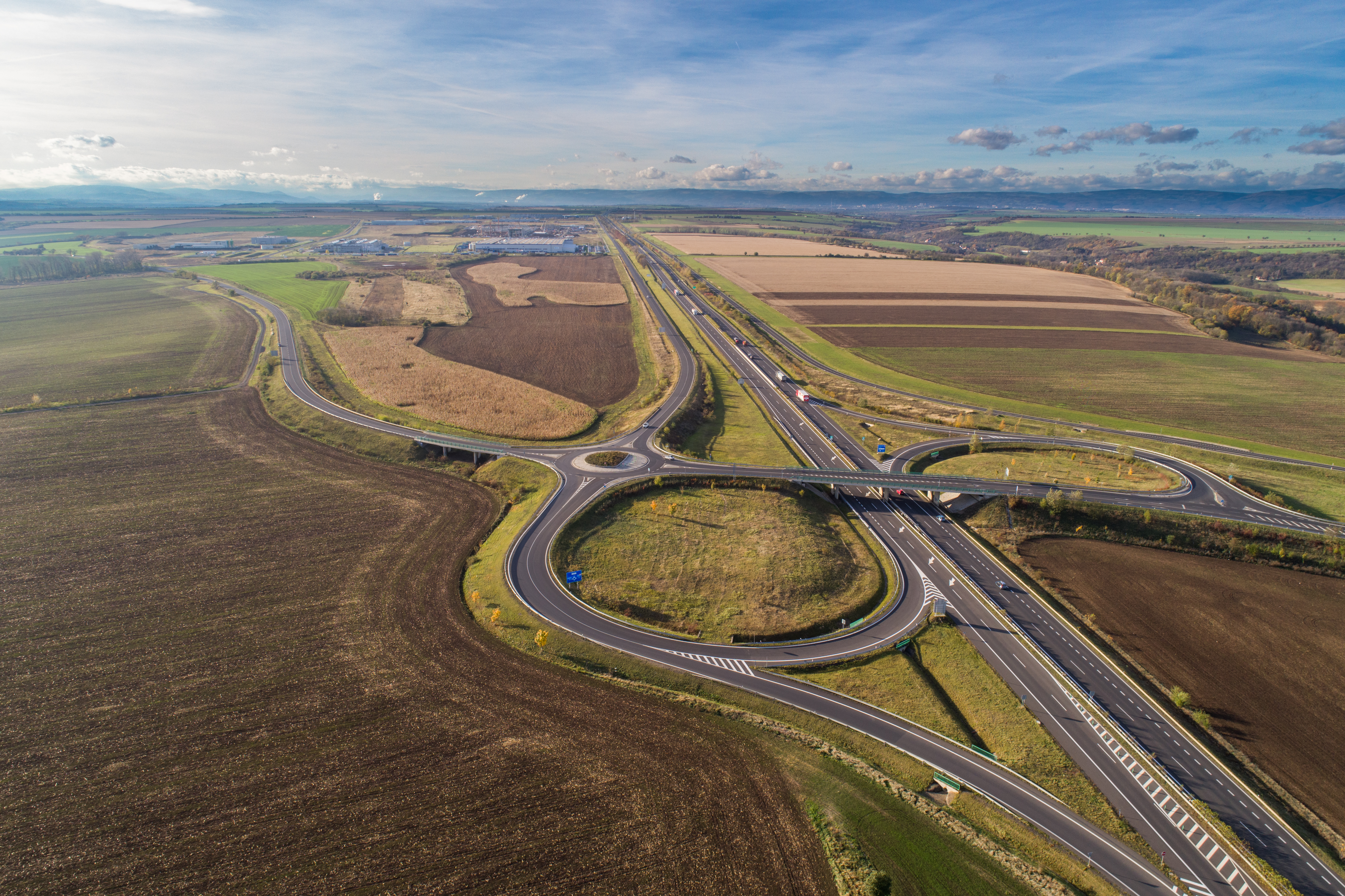 Letecký pohled na průmyslovou zónu Triangle od Loun.